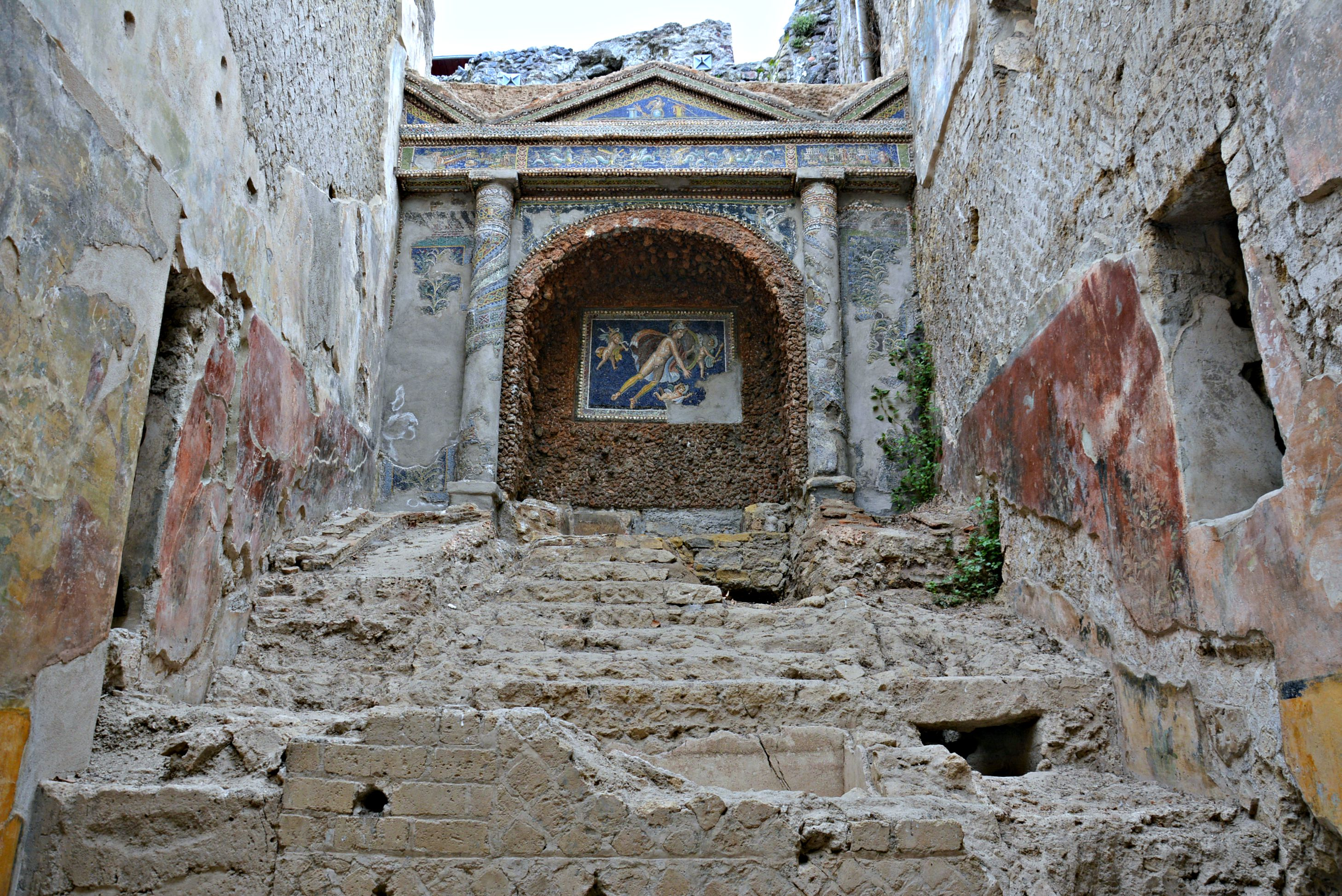 Terme Suburbane - MIBACT This is a photo of a monument which is part of cultural heritage of Italy.